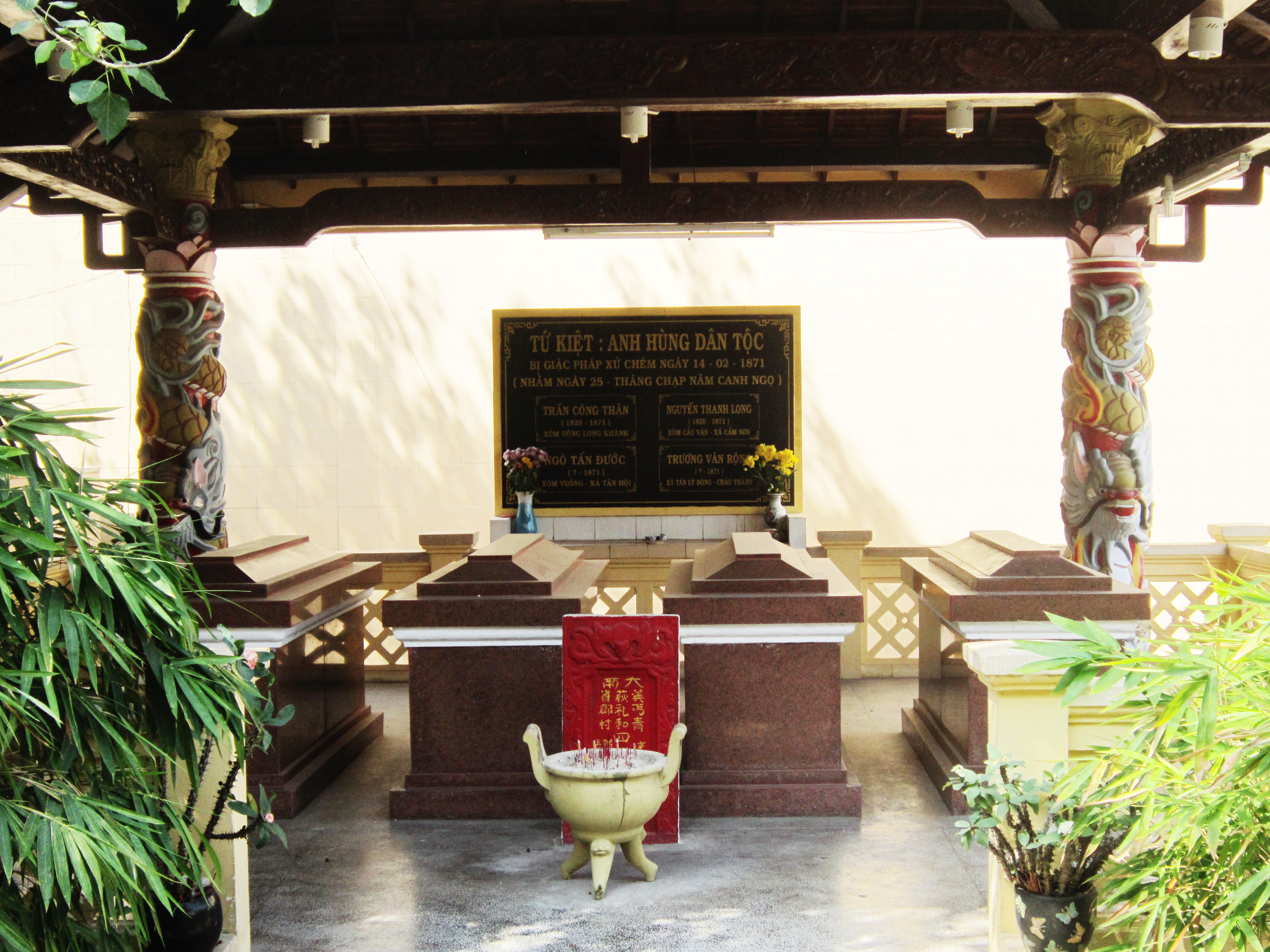 Mộ Tứ Kiệt tọa lạc tại đường 30-4, thị trấn Cai Lậy, huyện Cai Lậy, tỉnh Tiền Giang (Việt Nam). Nơi đây, ngoài nhà mộ còn có nhà thờ của Tứ Kiệt, là bốn vị anh hùng hào kiệt đã hy sinh trong công cuộc chống Pháp xâm lược trong quãng thời gian 1868 -1871..